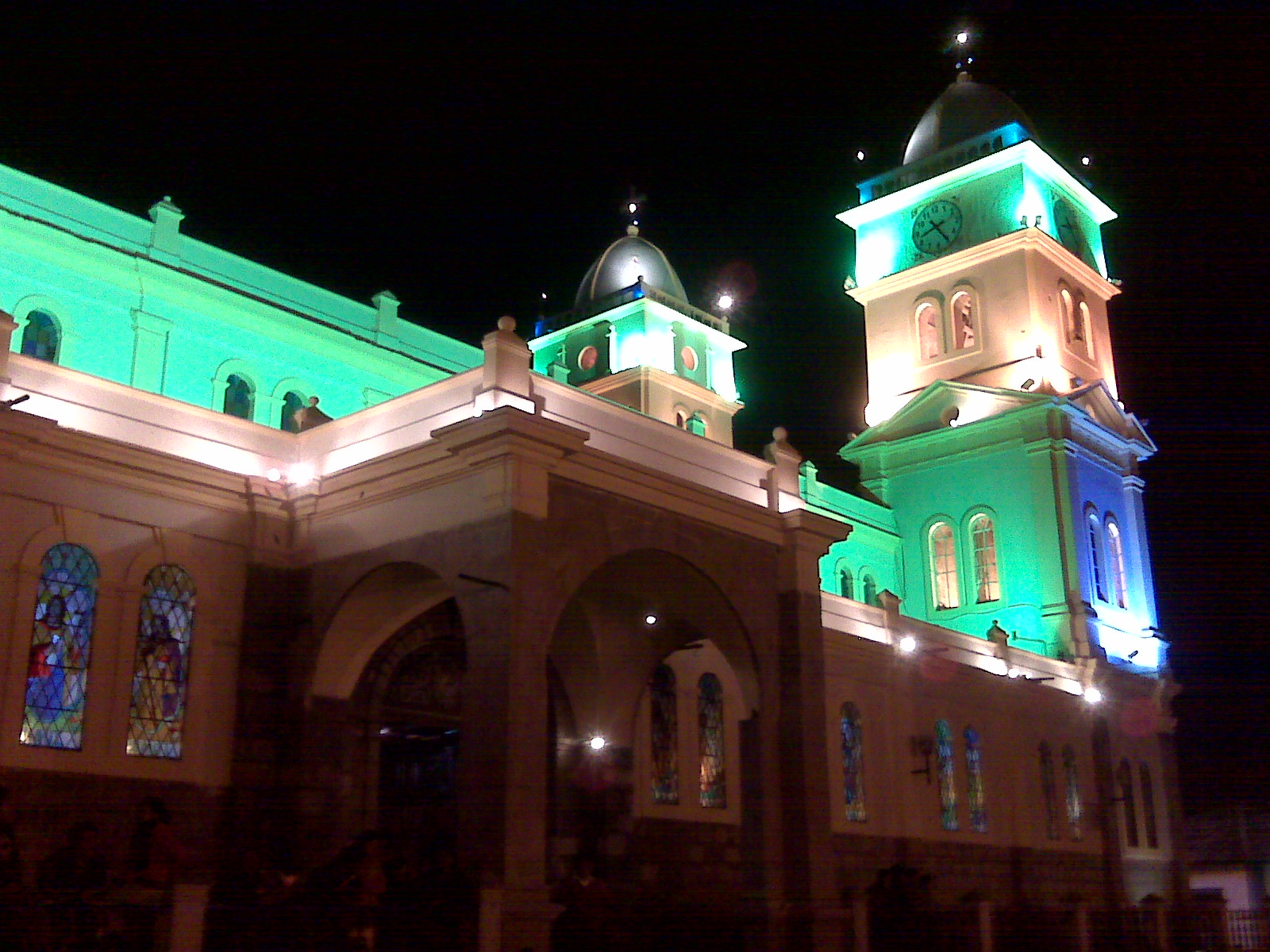 Imagen nocturna que muestra la puerta y las cúpulas de la iglesia de Guanujo vista desde su base.